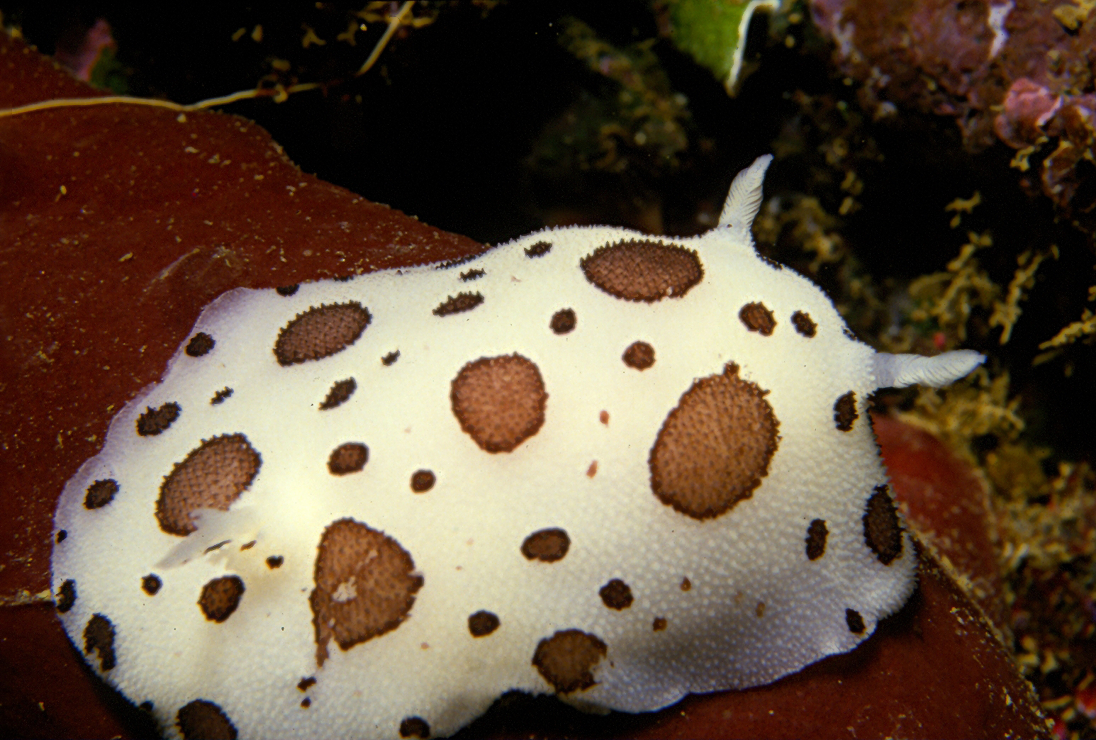 Peltodoris atromaculata ne se nourrit que du Spongiaire Petrosia ficiformis. Ce spongiaire est ici en présence de lumière qui lui donne cette couleur marron (protection UV), l'intérieur du spongiaire est blanc. La couleur du manteau du mollusque imite à la perfection le spongiare taches marrons, sur fond blanc, et lorsque le mollusque est dans le spongiare, il passe totalement inaperçu. A noter les petits tubercules sur le manteau qui contiennent des spicules pour sa défense et ces spicules ne proviennent en aucun cas du spongiaire, car ils ne traversent pas le tube digestif pour aller se fixer dans le manteau, le mollusque fabrique lui-même ses spicules, c'est la spiculogénèse, les spicules ingérés étant broyés.